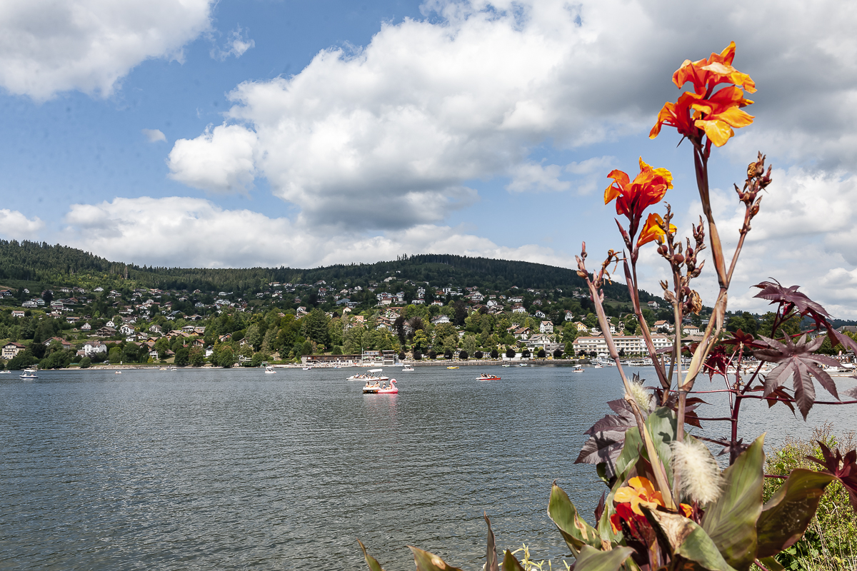 Vue du Lac de Gérardmer (Vosges)